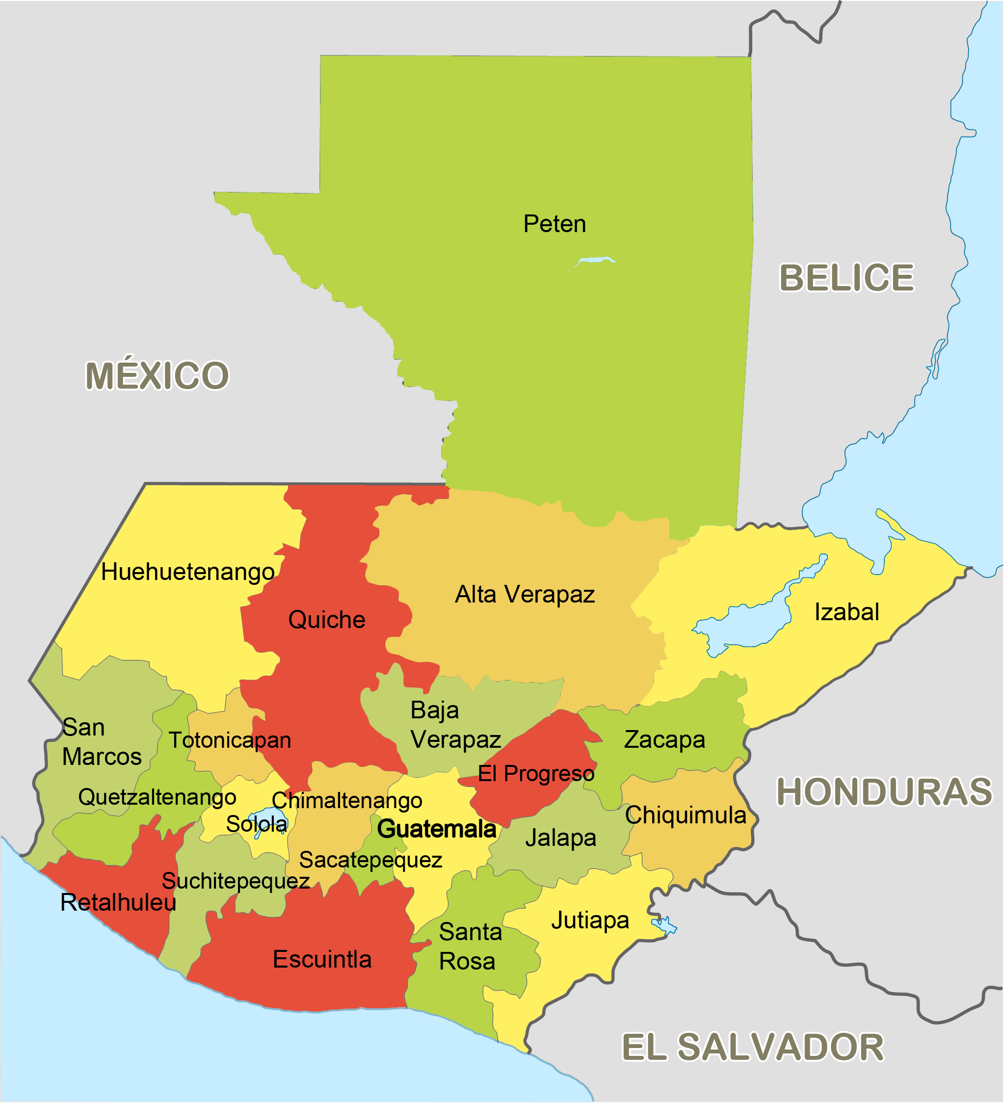 Mapa de Guatemala dividido en cada uno de sus 22 departamentos